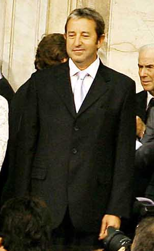 El Vice-presidente de la Nación Argentina, Julio Cobos luego de asumir al cargo.